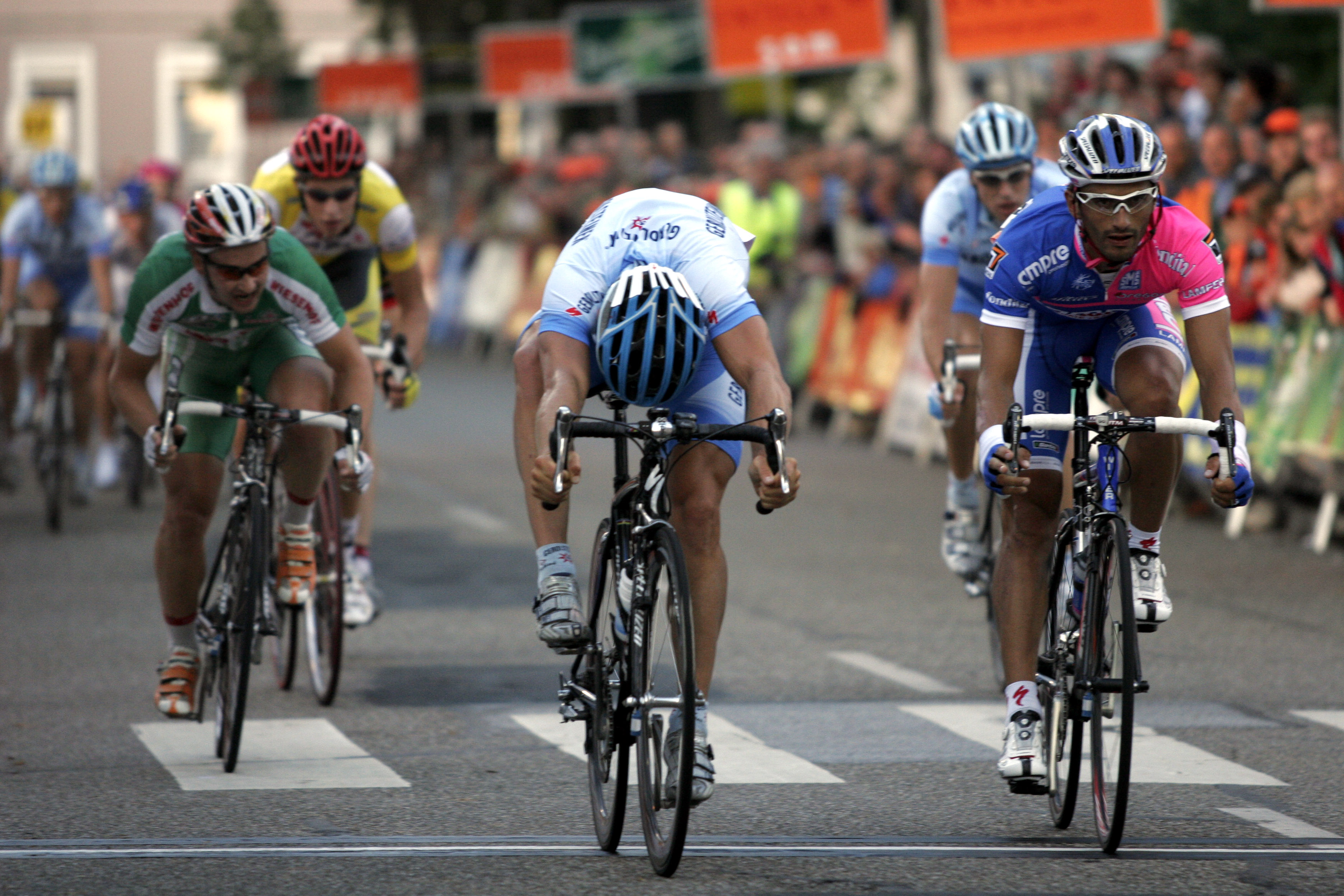 Tigersprung im Radsport. Phase 3: der Tigersprung. Aufgenommen am 2. August 2007 in Lorsch (Südhessen) beim Entega Grand Prix. In der Bildmitte Robert Förster (Team Gerolsteiner) mit dem Tigersprung und rechts Daniele Bennati (Team Lampre-Fondital)